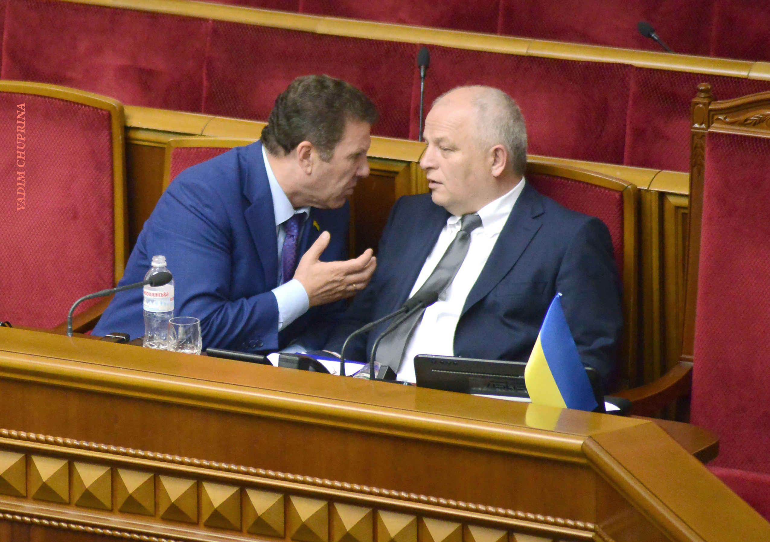 Куницын Сергей и Кубив Степан в Верховной Раде Украины, 2016, фото Чуприна Вадим. А